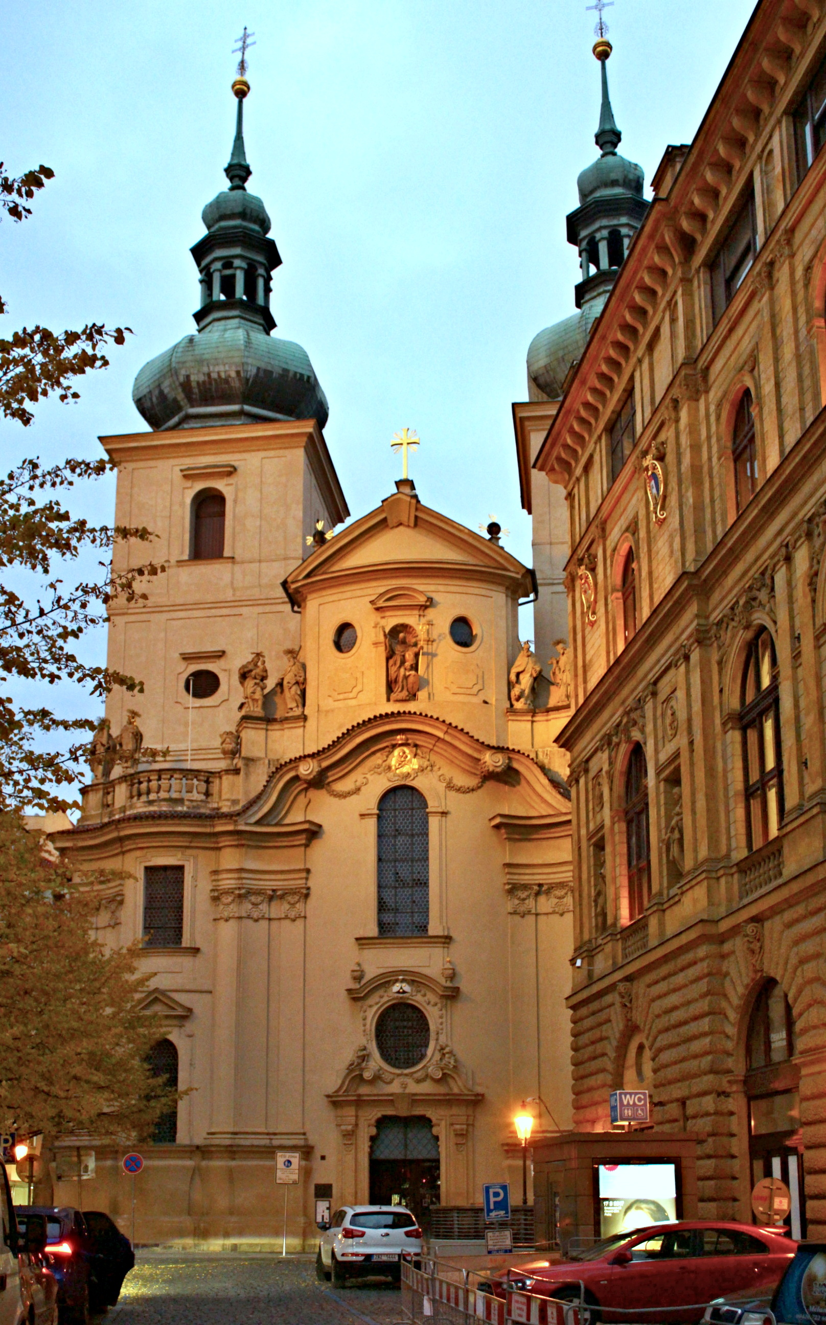 kostel svatého Havla na Starém Městě